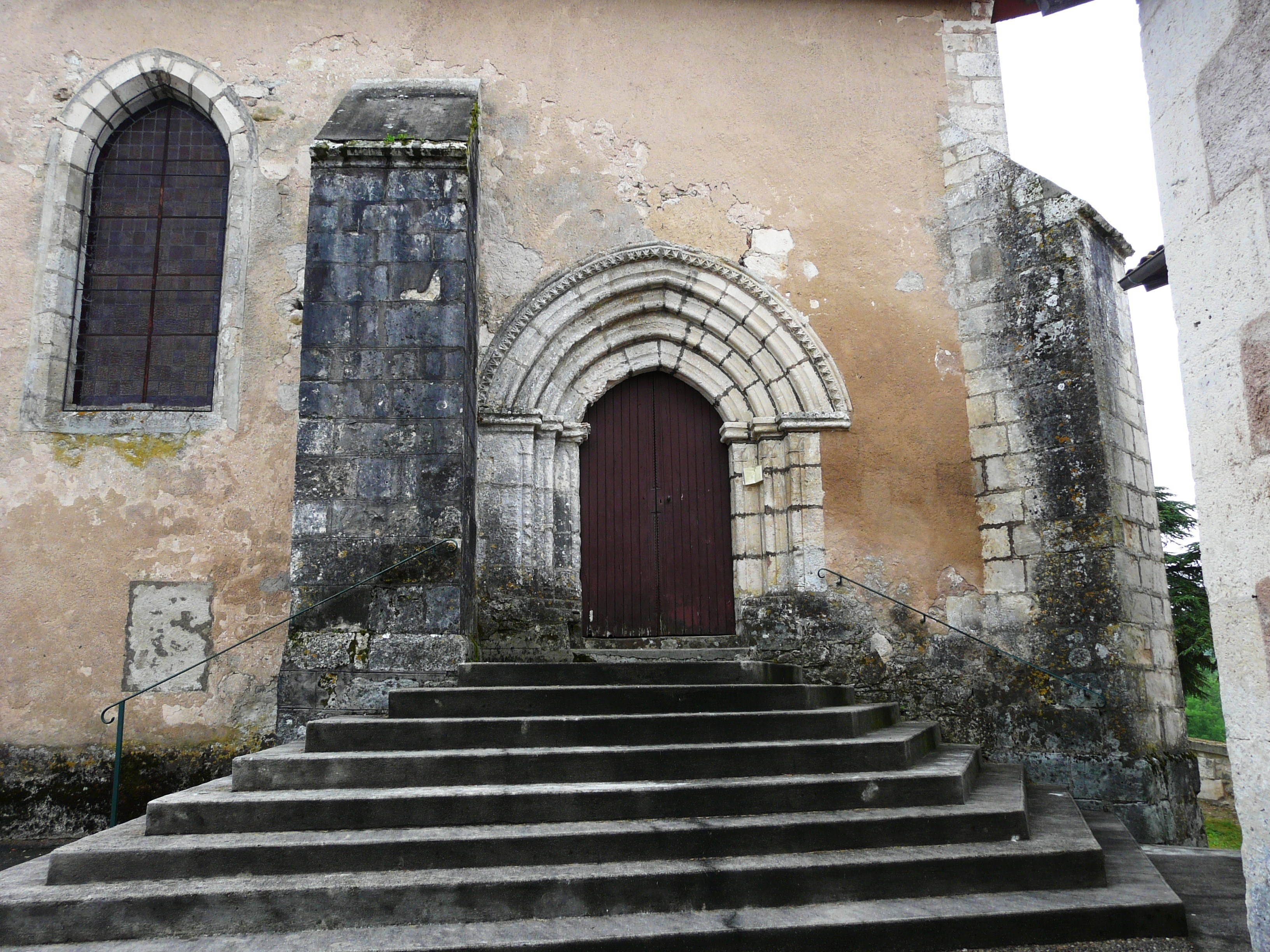 Le portail de l'église Saint-Crépin et Saint-Crépinien, Saint-Crépin-de-Richemont, Dordogne, France